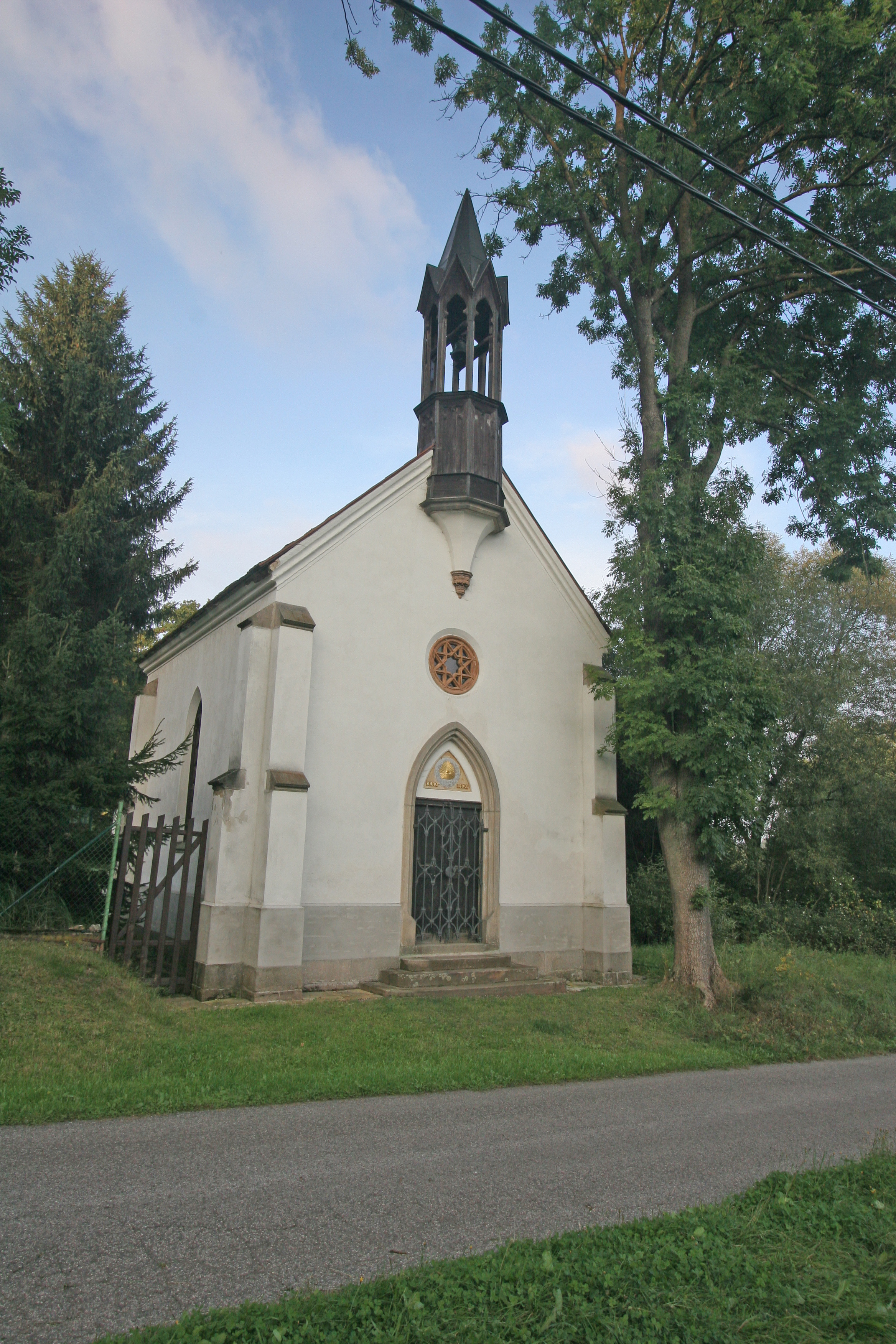 Kaple (Křenov), Křenov, Křenov (Bernartice).